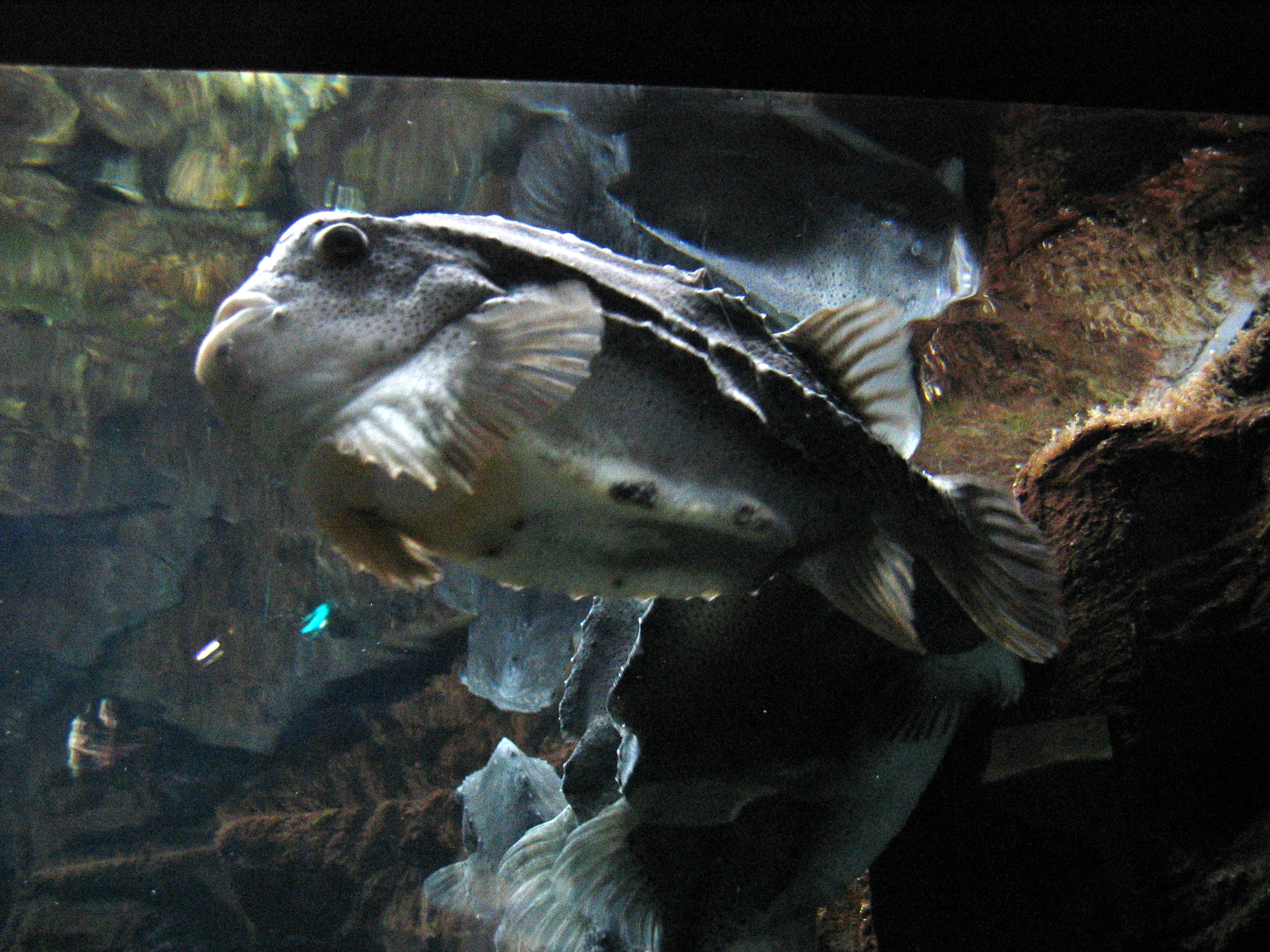 Les aquariums d'Océanopolis, Brest : Cyclopterus lumpus – Lumpe